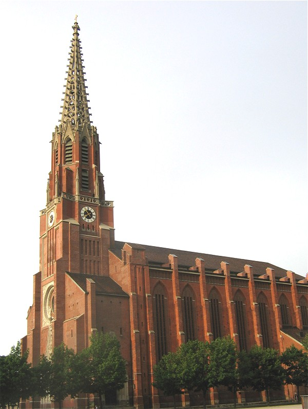 Mariahilf-Kirche Muenchen